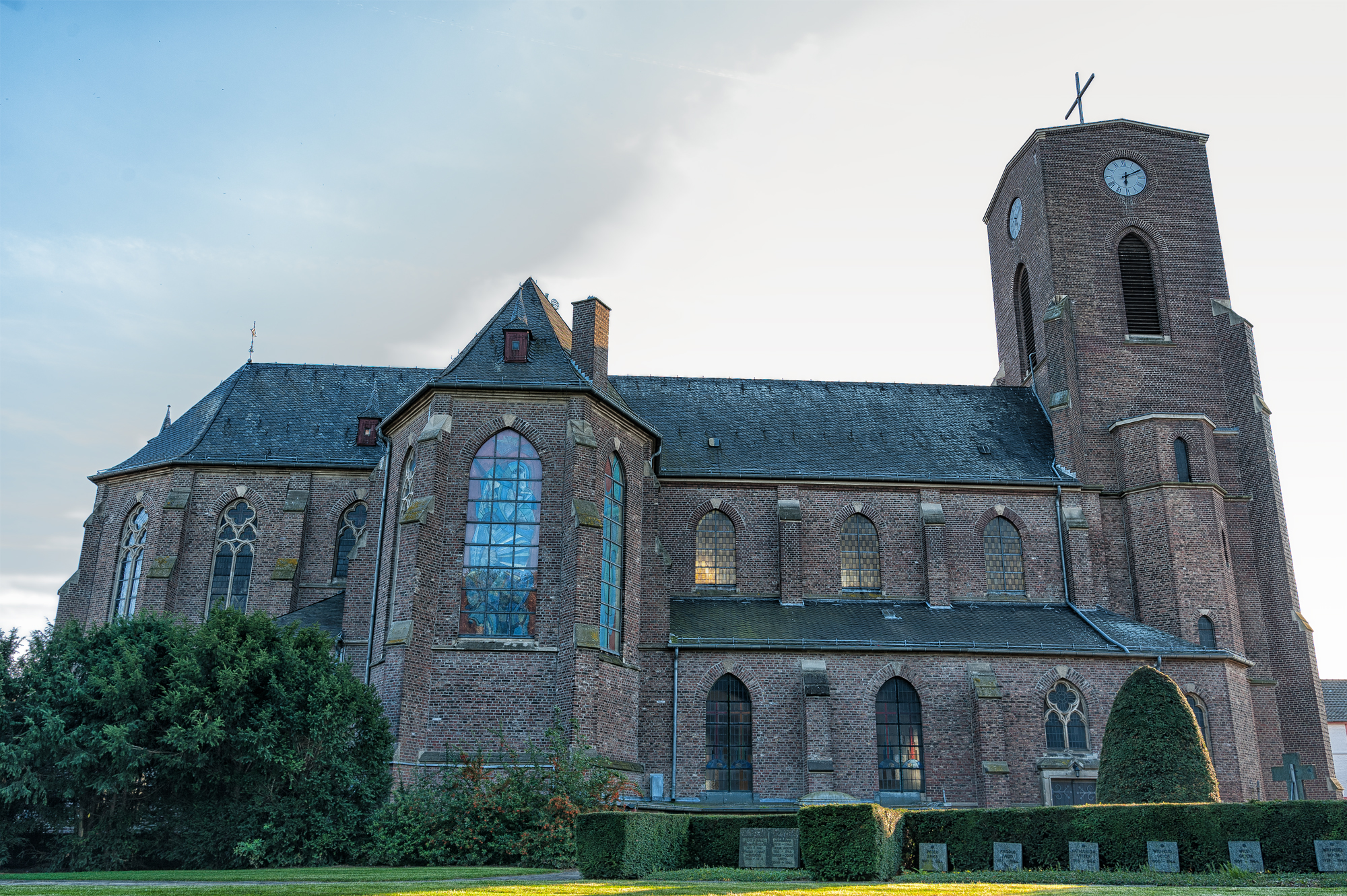 Kirche St. Michael im Dürener Stadtteil Echtz, Nordrhein-Westfalen. This is a photograph of an architectural monument. /001